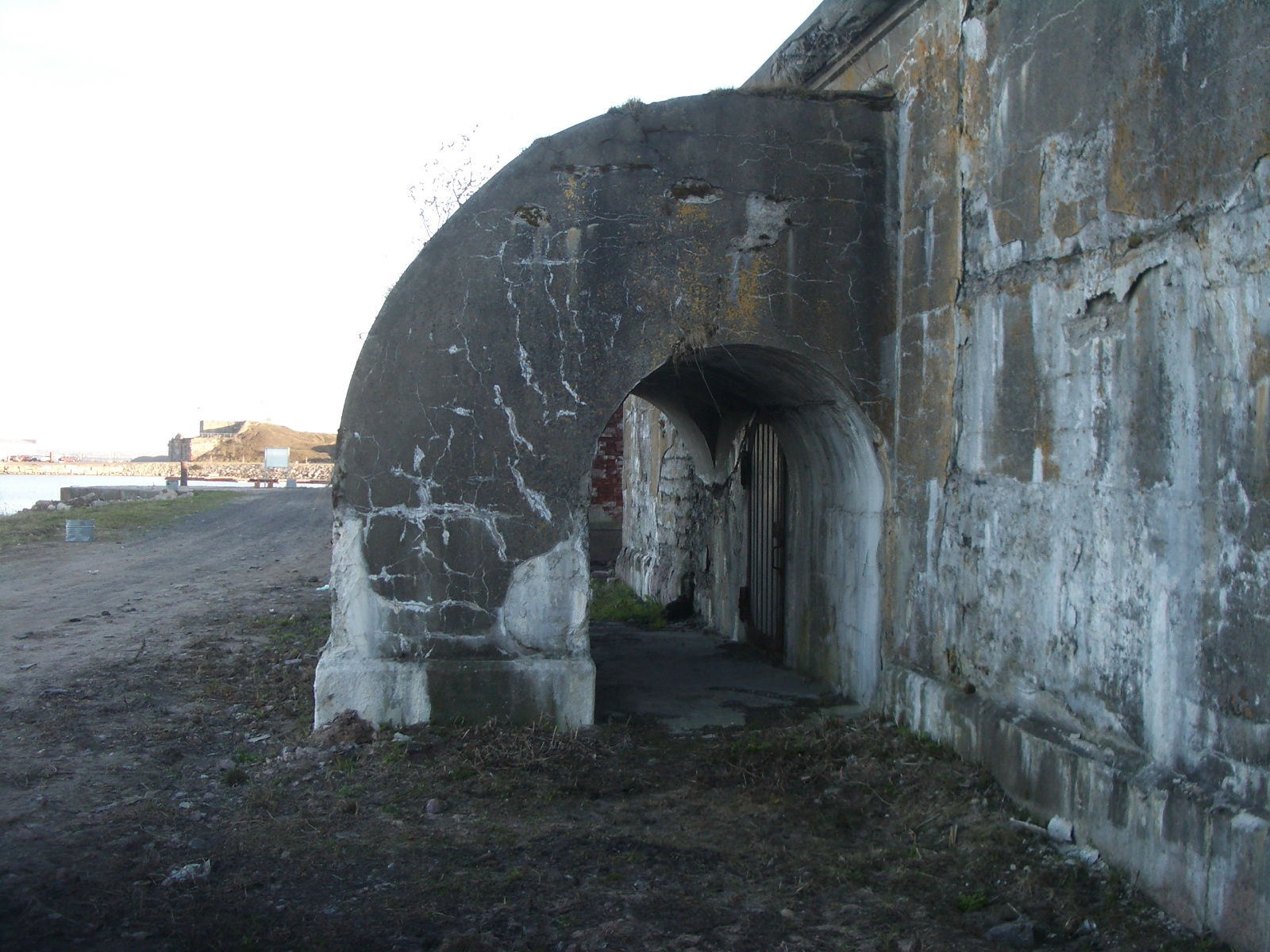 форт константин сквозник